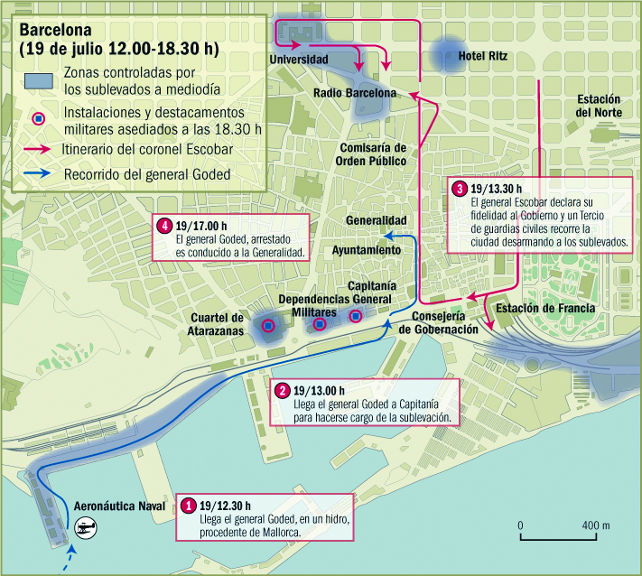 Infografía que narra los combates ocurridos en Barcelona el día 19 de julio de 1936. Página 55 del libro "La sublevación".